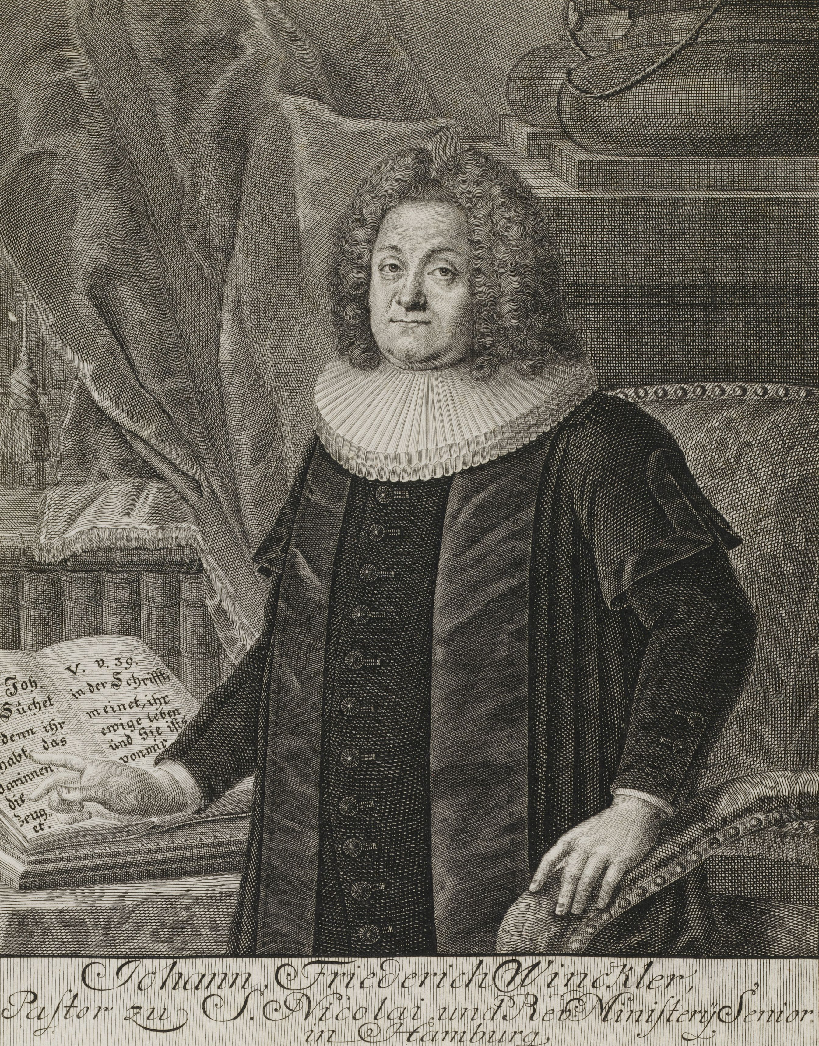 Johann Friederich Winckler, Pastor zu S. Nicolai und Rev. Ministery Senior in Hamburg